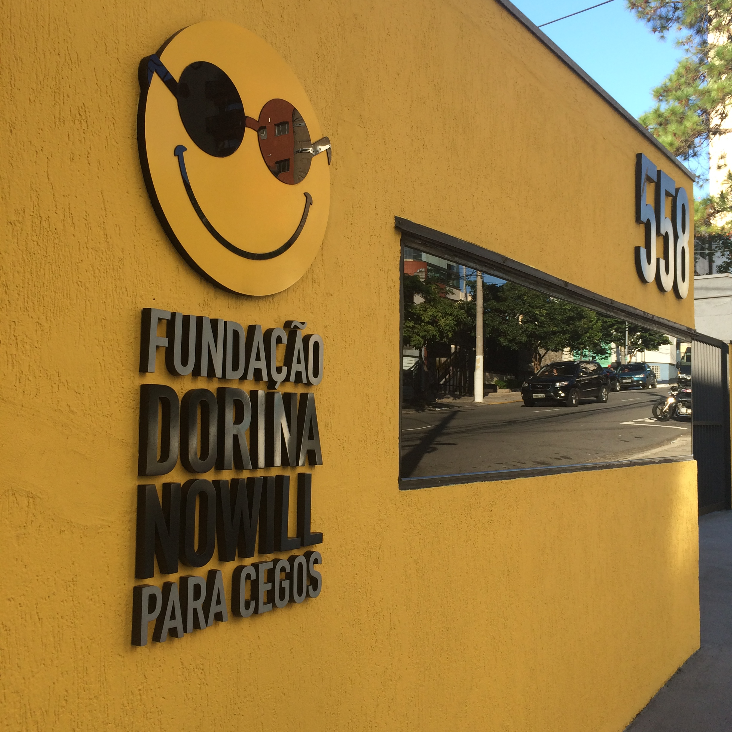 Visão do logo aproximado